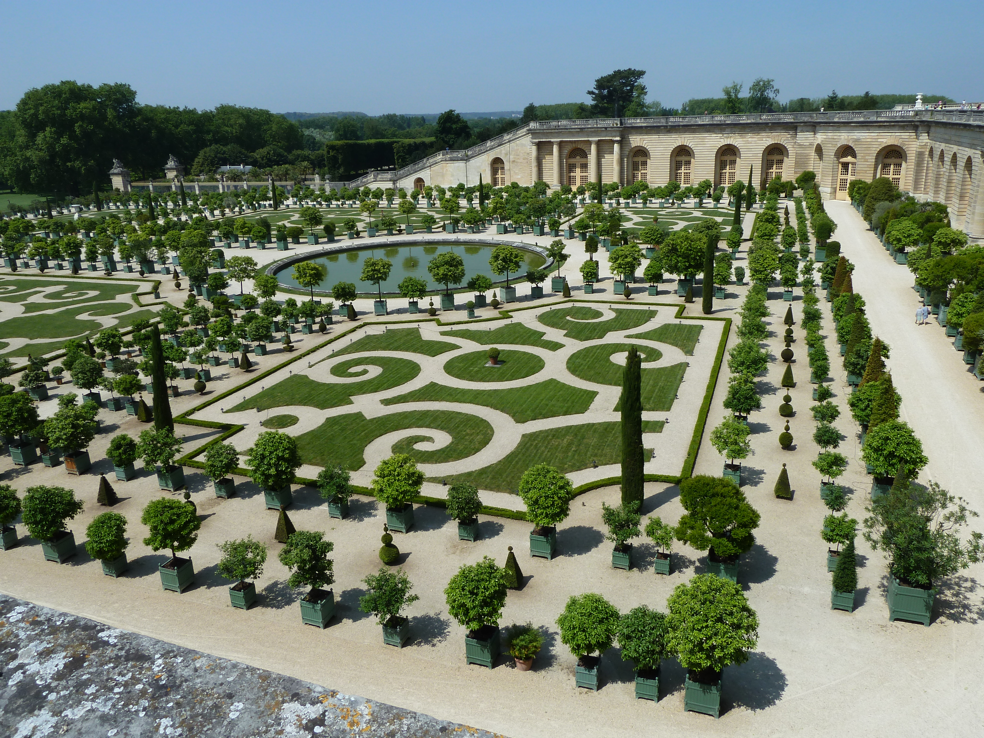 Château de Versailles orangerie